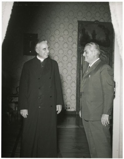 Il presidente della Camera dei Deputati Brunetto Bucciarelli Ducci riceve il nunzio apostolico Egano Righi-Lambertini